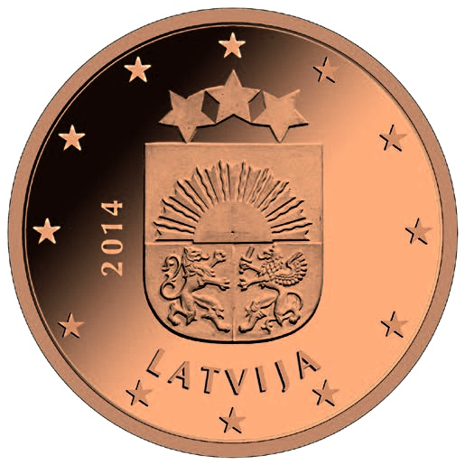 拉脱维亚1欧分硬币